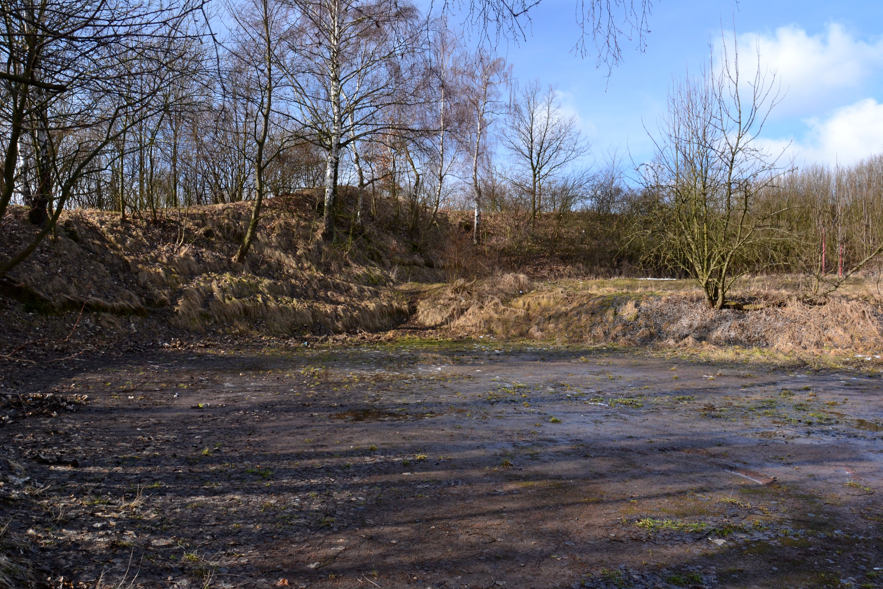 Vnitřní plocha hradu s vnitřní stranou severního valu